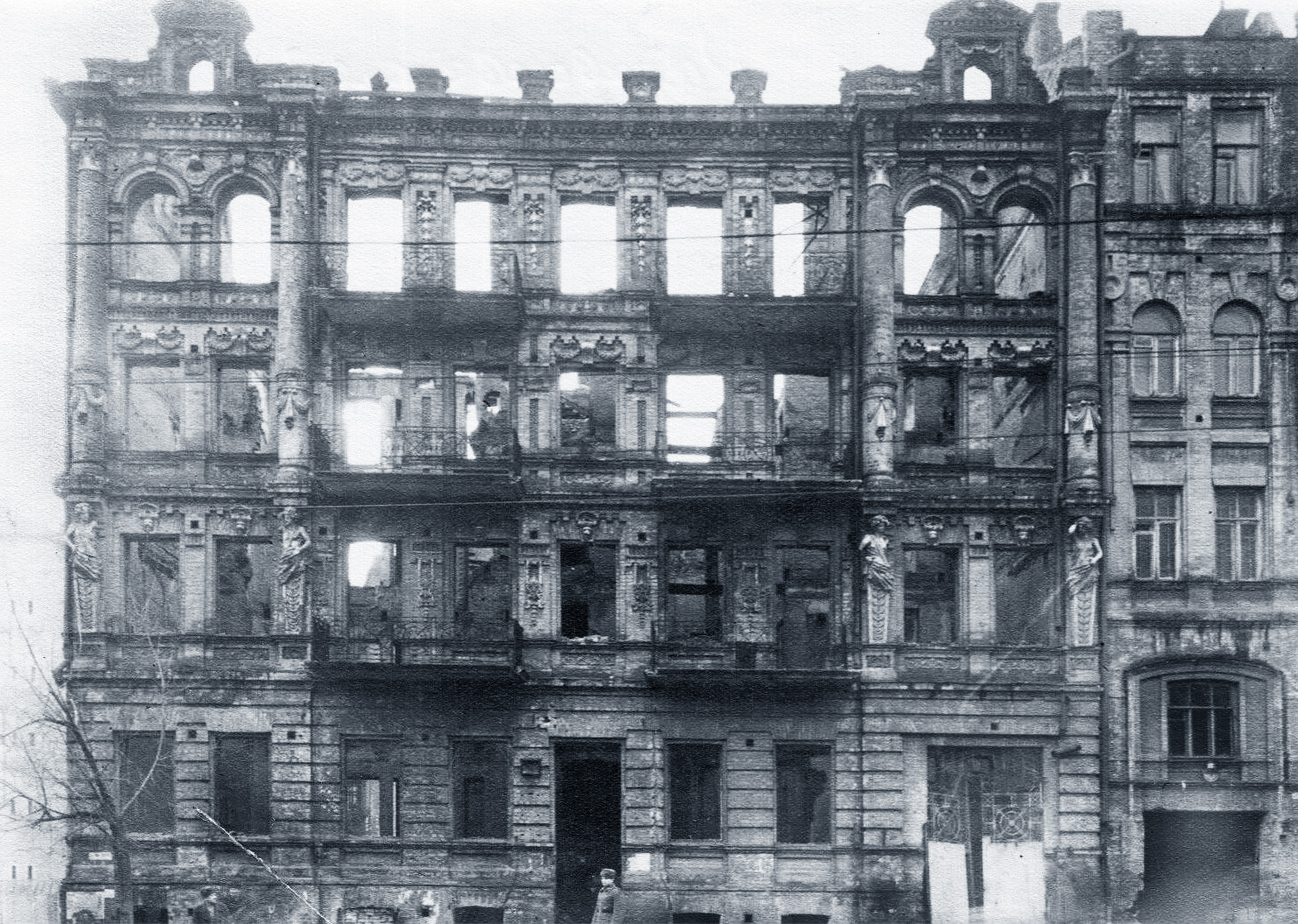 Будинок прибутковий, Київ, вул. Л. Толстого, 01